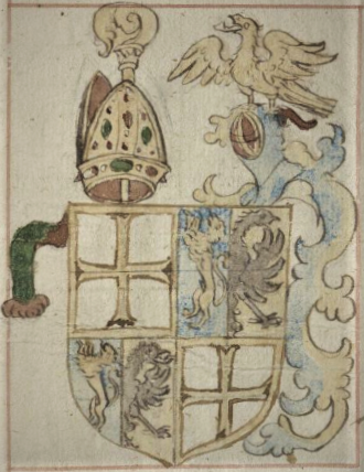 Bischofswappen Arnold Westphal aus der Rehbein-Chronik, Heft H, S. 29 (454)